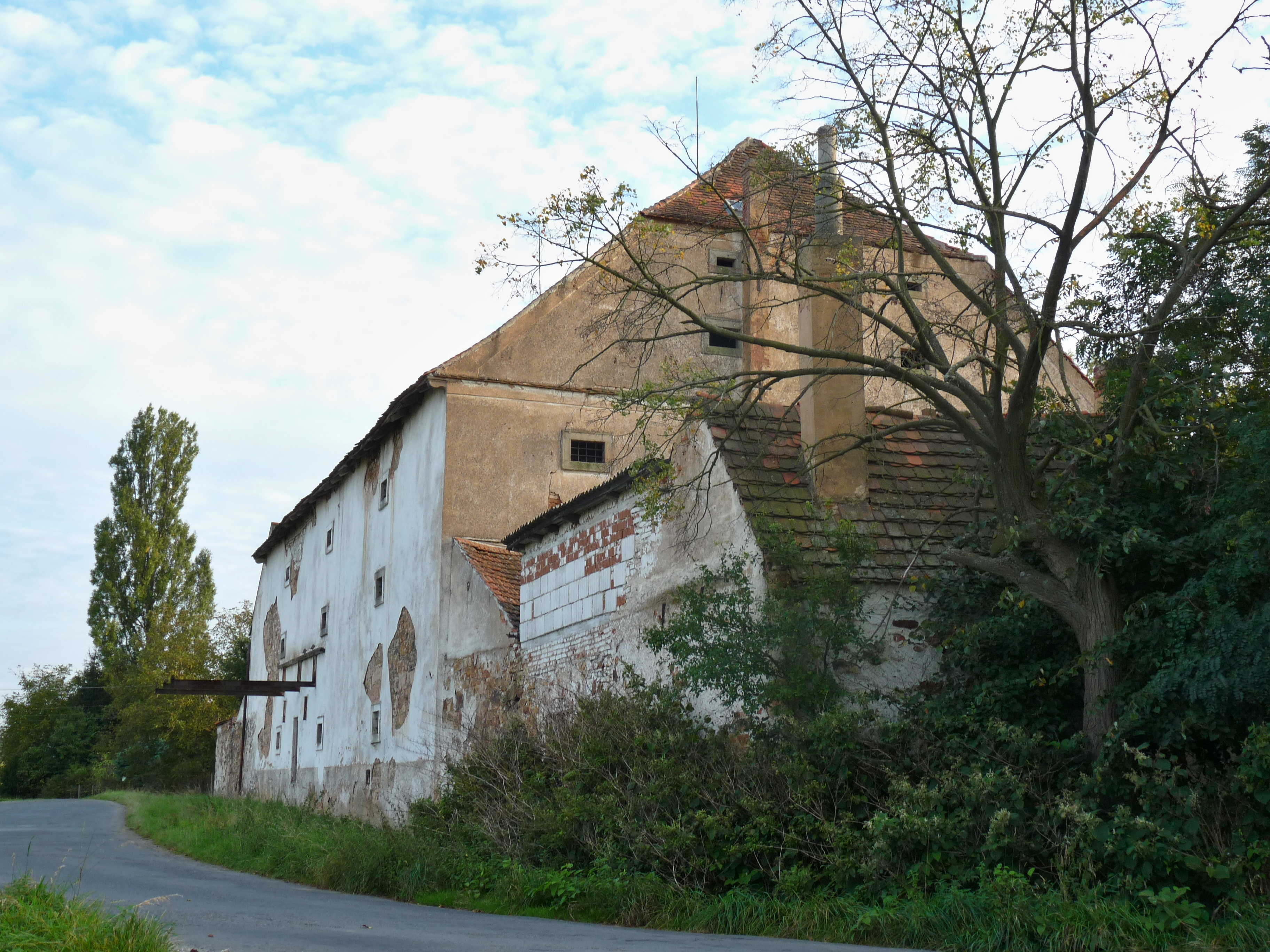 Zemědělský dvůr Sechutice, Hadačka 20, Hadačka.